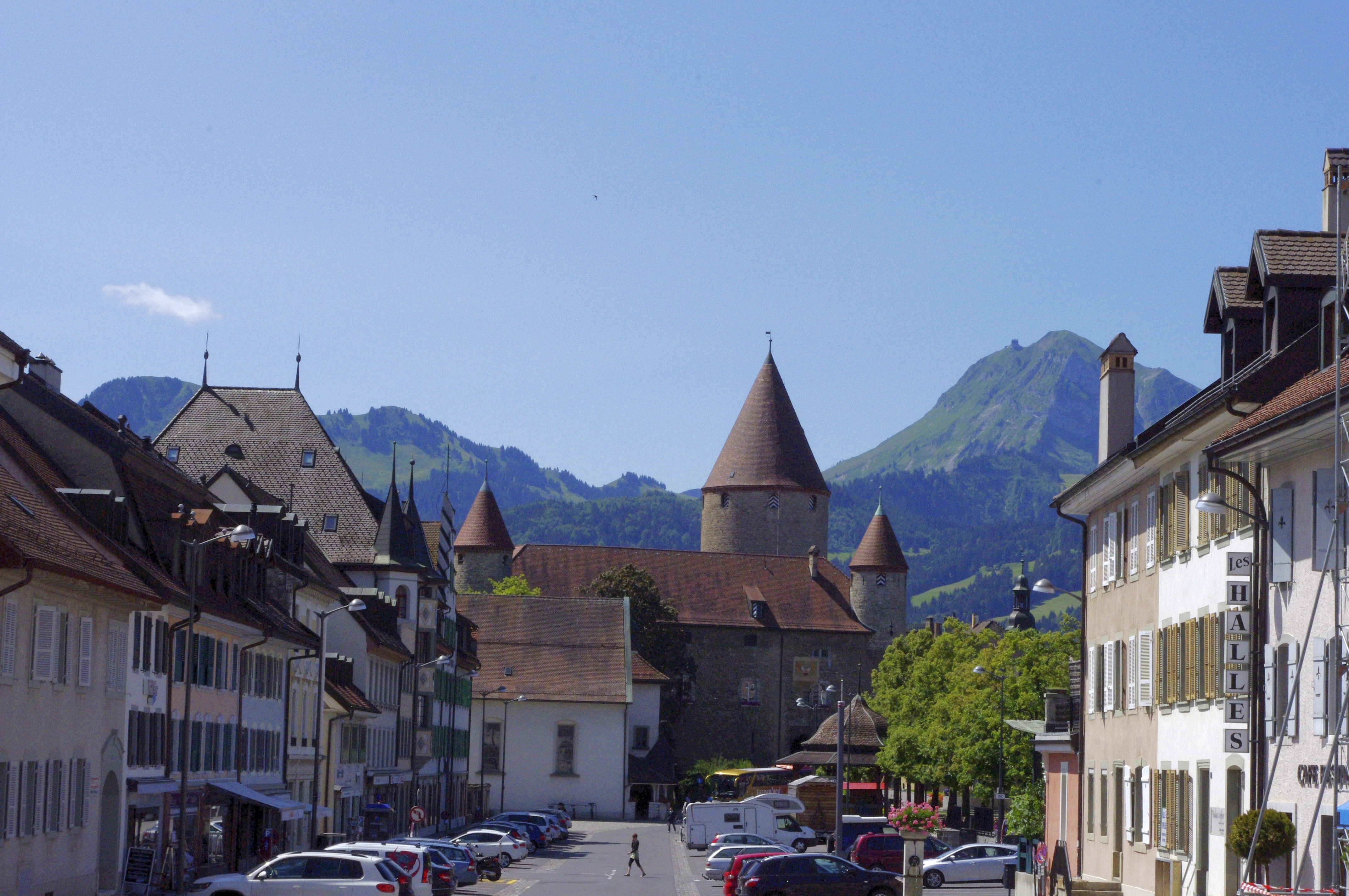 Bulle, Suisse